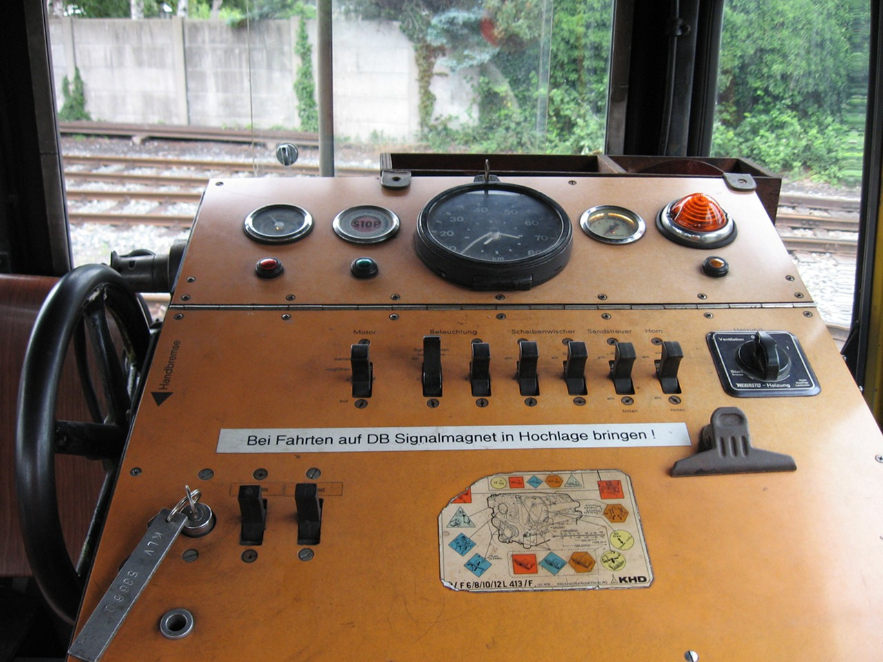 Führertisch Schwerkleinwagen Bauart 53.